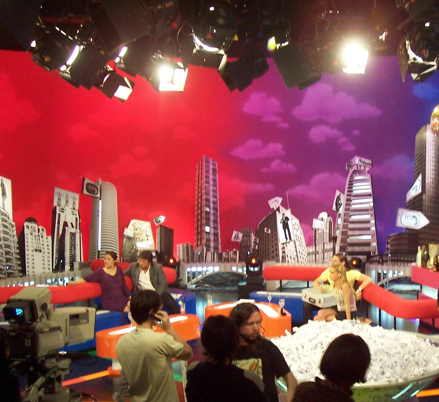 El programa argentino RSM (Resumen de los Medios) transmitido en vivo desde los estudios de América Televisión en el barrio porteño de Palermo.